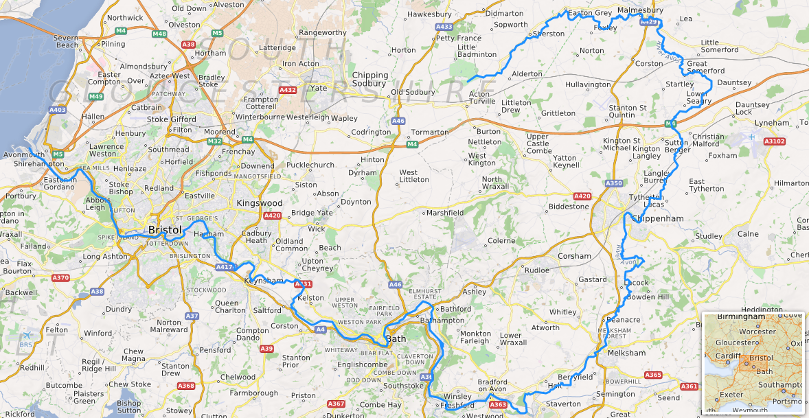 carte réalisée sur umap [1] This map may be incomplete, and may contain errors. Don't rely solely on it for navigation.